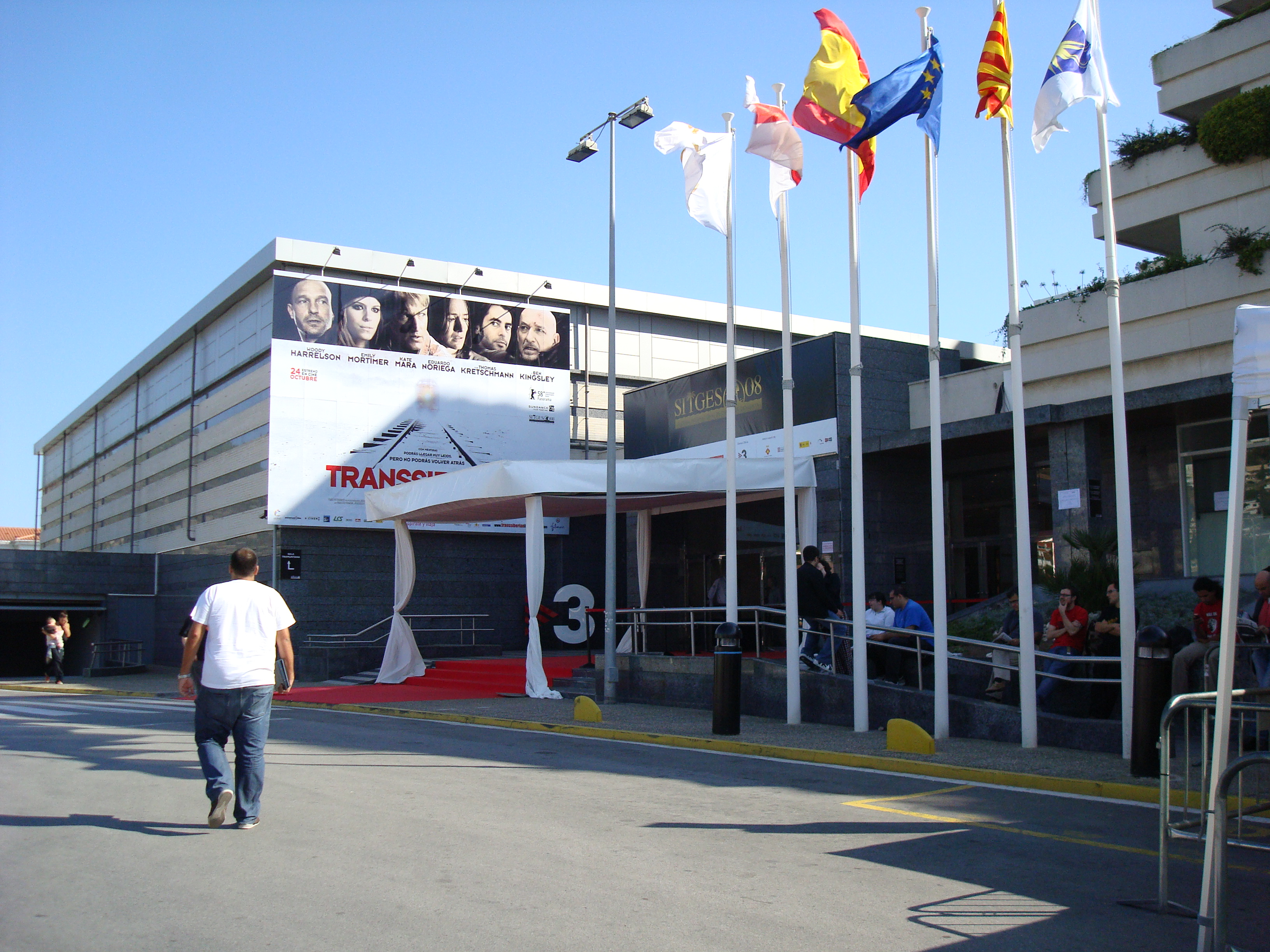 Festival Internacional de Cine de Cataluña - Siges 2008